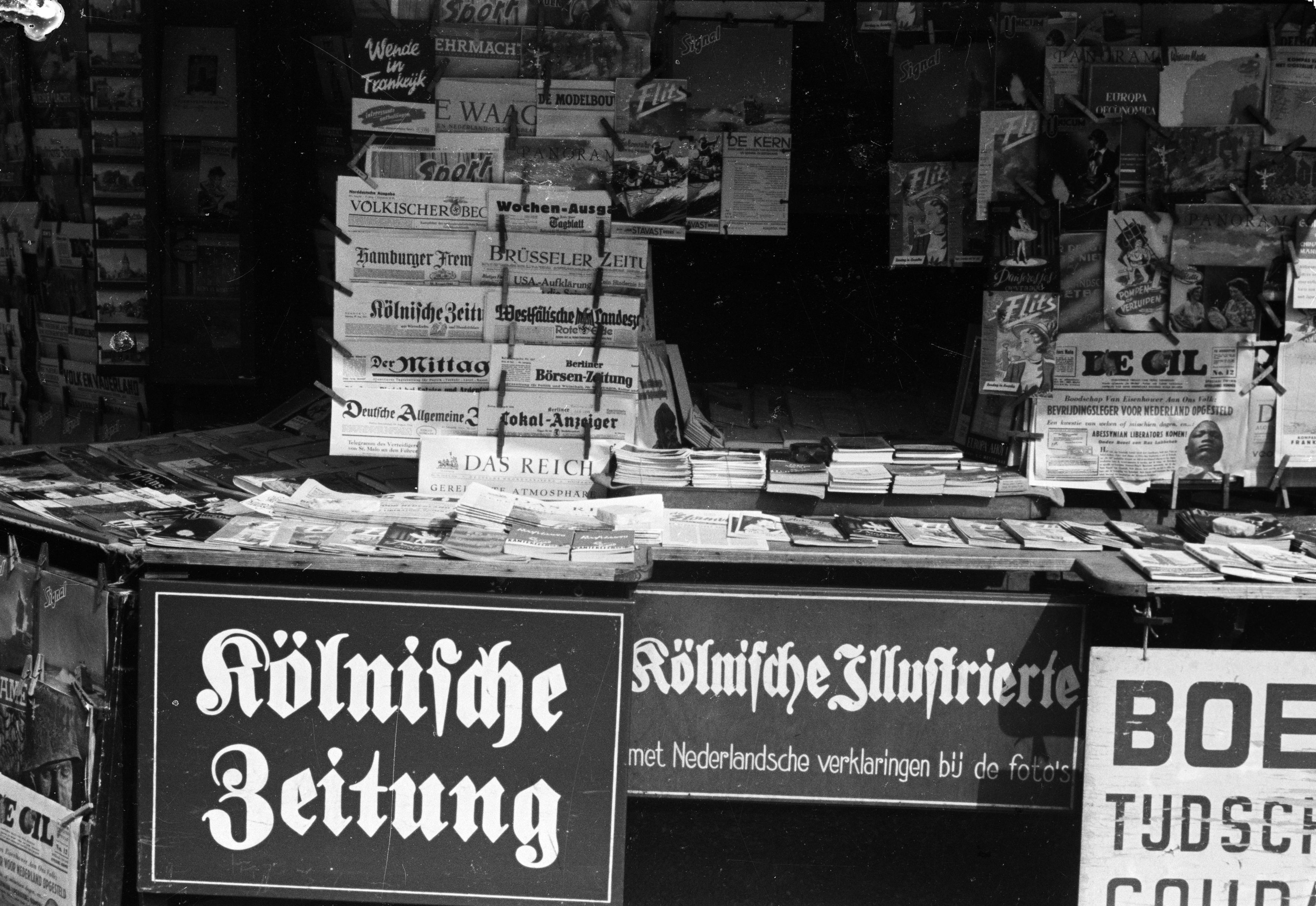 Foto uit de collectie Huizinga van het NIOD. Het overwegend Duitstalige aanbod van periodieken in een door de Duitse bezetter overgenomen kranten- en tijdschriftenkiosk. Menno Huizinga was onderdeel van de Ondergedoken Camera en maakte illegaal foto’s tijdens de bezetting. Dit deed hij hoofdzakelijk in zijn woonplaats Den Haag.